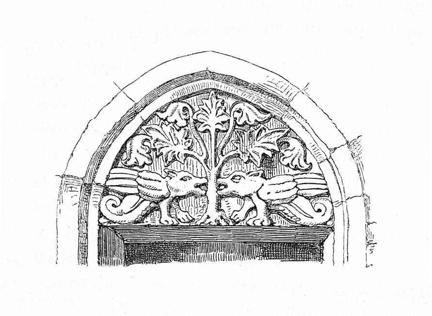 Bilder aus dem in derselben Kategorie befindlichen Artikel aus den Mittheilungen der kaiserl. königl. Central-Commission zur Erforschung und Erhaltung der Baudenkmale Band 1, 1856. This is a photo of a monument in Hungary, Identifier: 4915